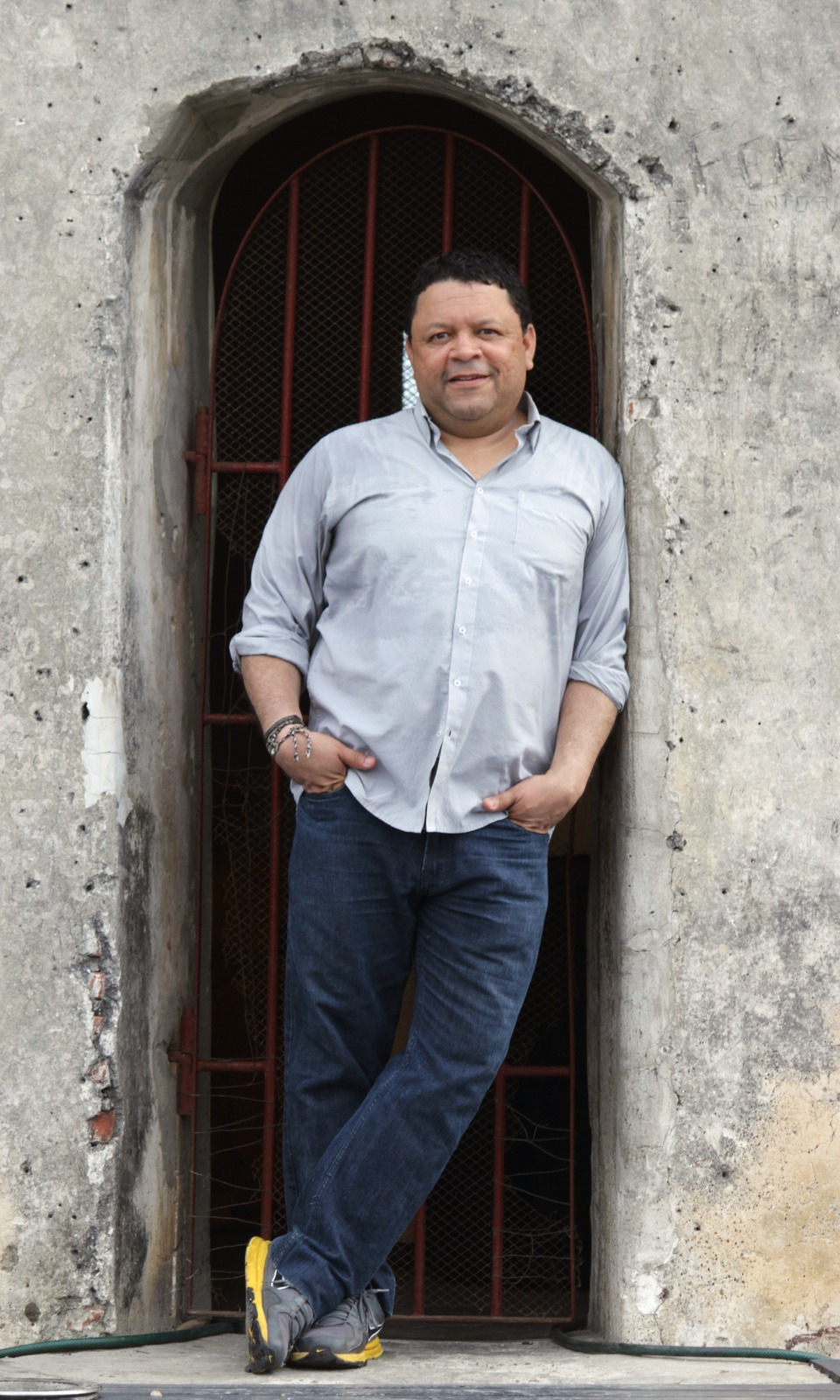 Foto Lida Corcione